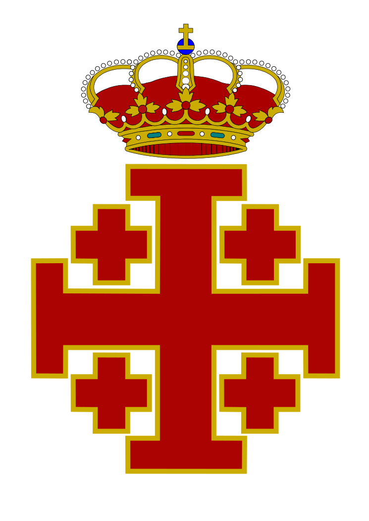 Escudo de la Real Cofradía del Santo Sepulcro y de la Soledad de Villarrobledo